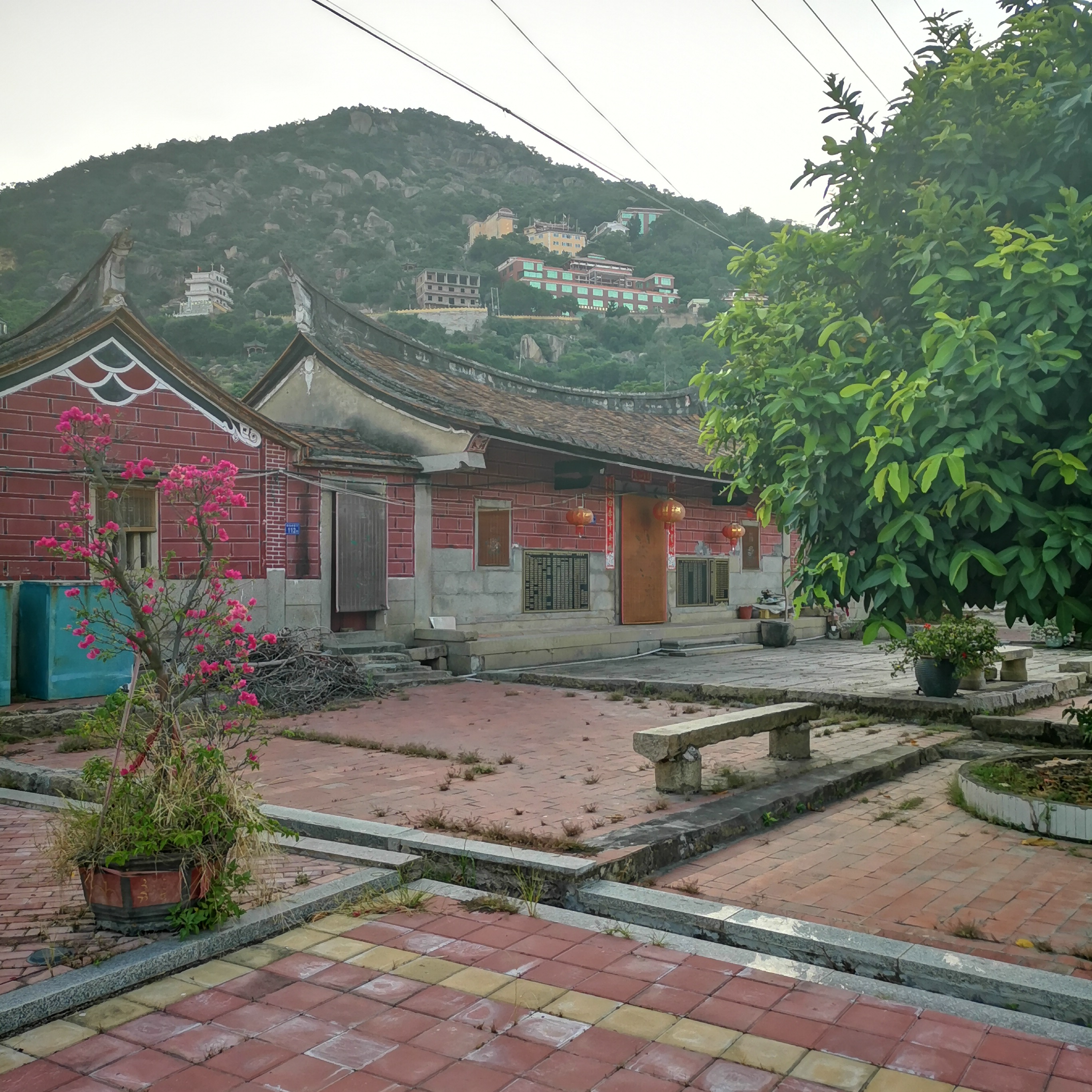 漳州龙海浮宫镇田头村